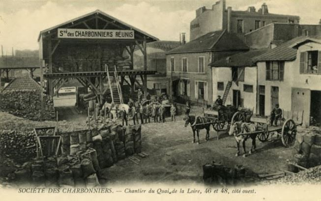 Paris, quai de la Loire